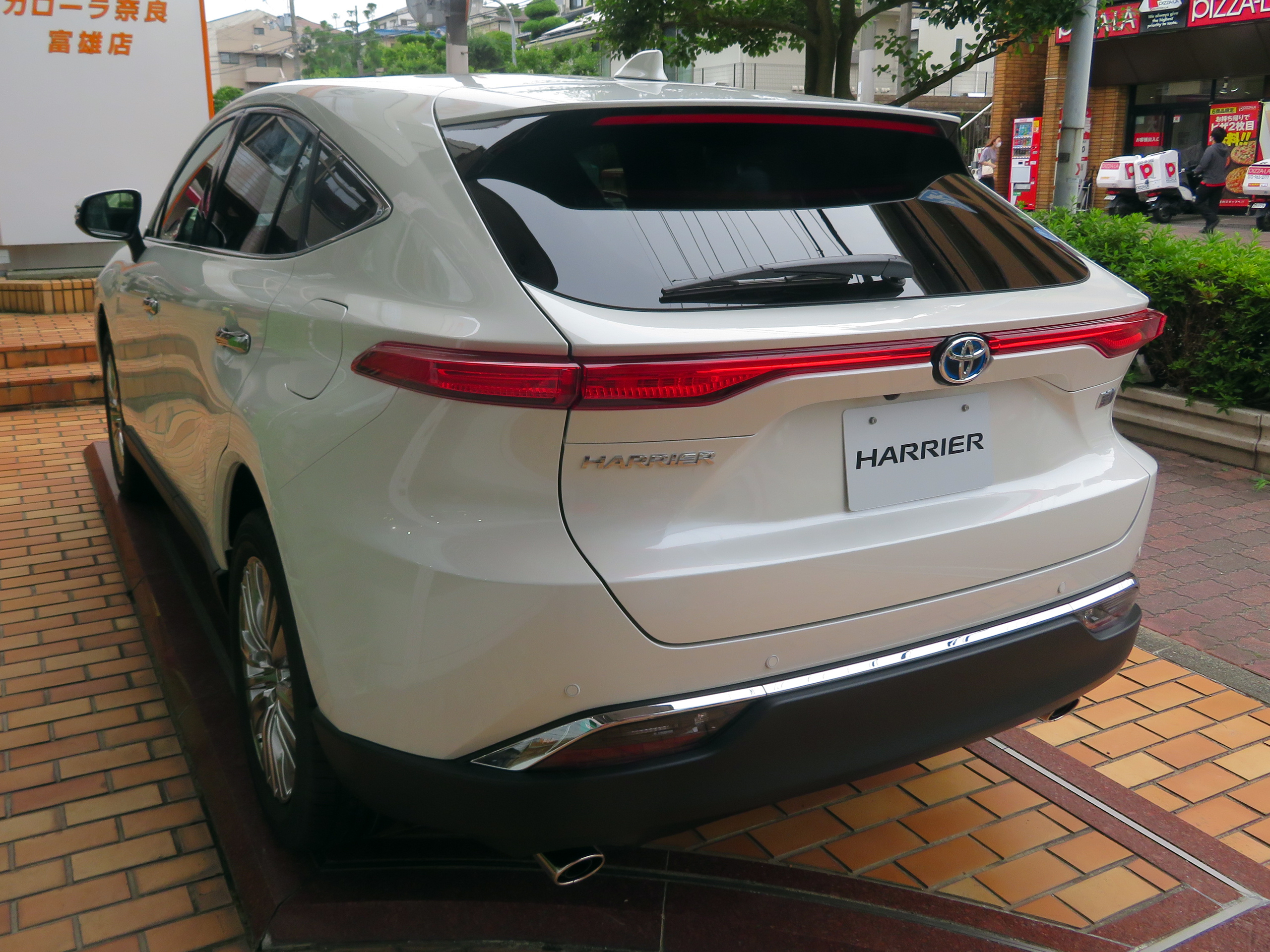 6AA-AXUH80-ANXSB(S)型トヨタ・ハリアーHYBRID Z"Leather Package"2WDをリアから撮影。